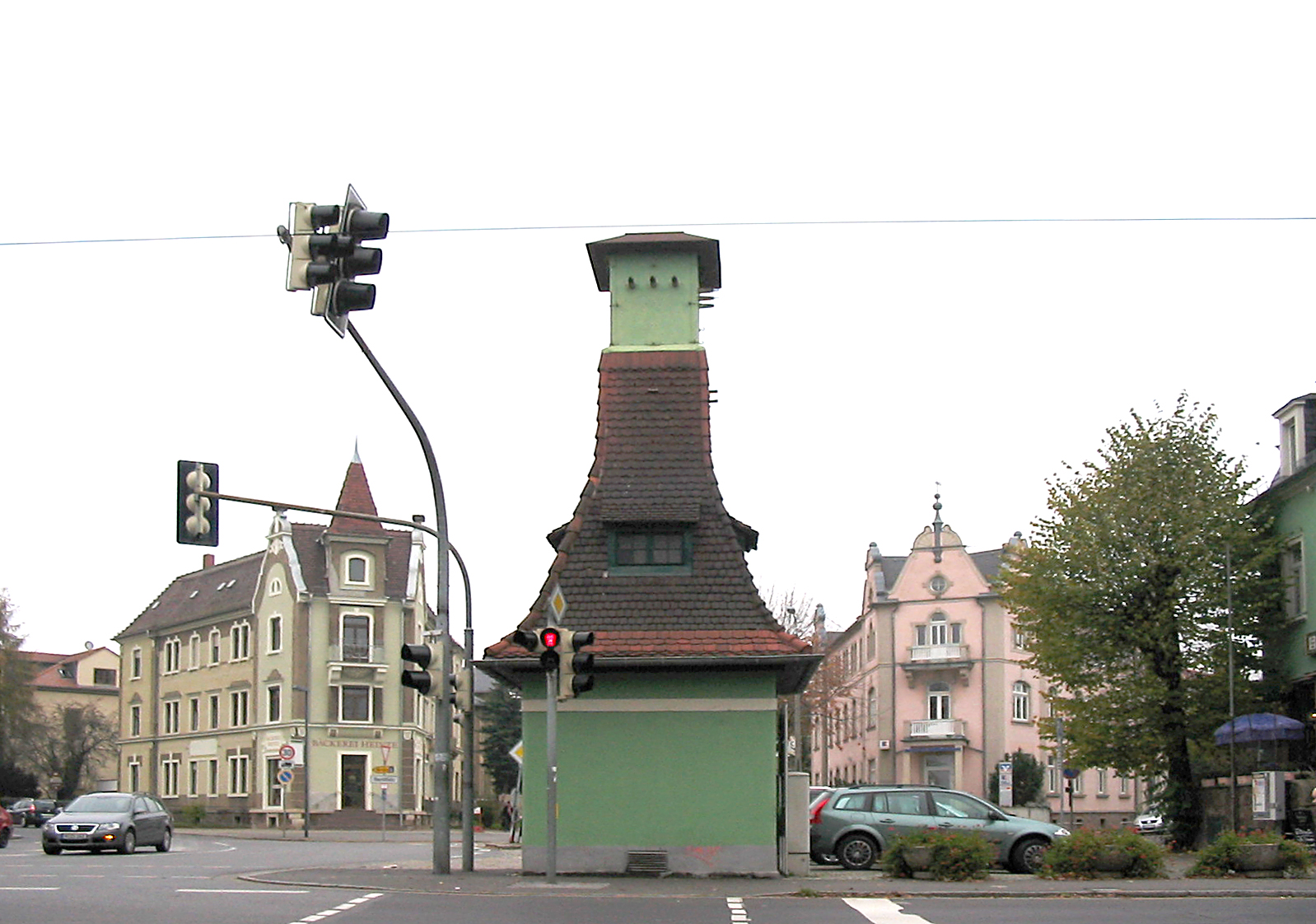 Radebeul, Wohn- und Geschäftshaus Karl-Marx-Straße 1 (Radebeul) und Nr. 2 (re.), von der Meißner Straße aus